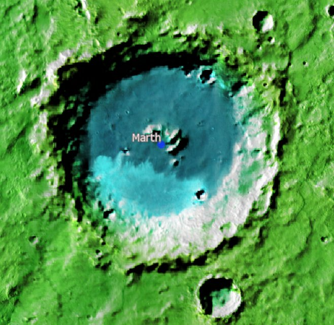 Cráter marciano Marth. (Imagen IAU/USGS/Goddard/A SU/USGS)